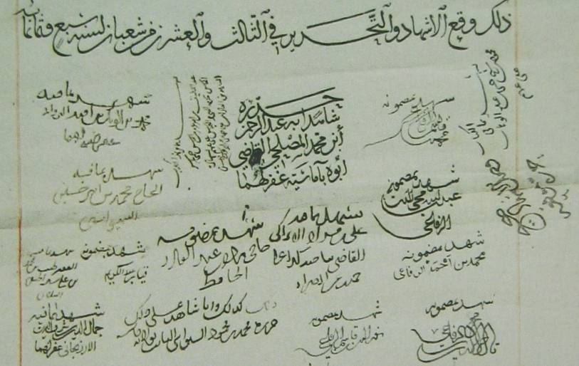 Unterschriften der Zeugen unter einer Vakfiye (Stiftungsurkunde) für ein von Mahmud Çelebi gestiftetes Imaret. Sie lassen den Übergang von der linearen Schreibweise zu pençe und Tughra erkennen.